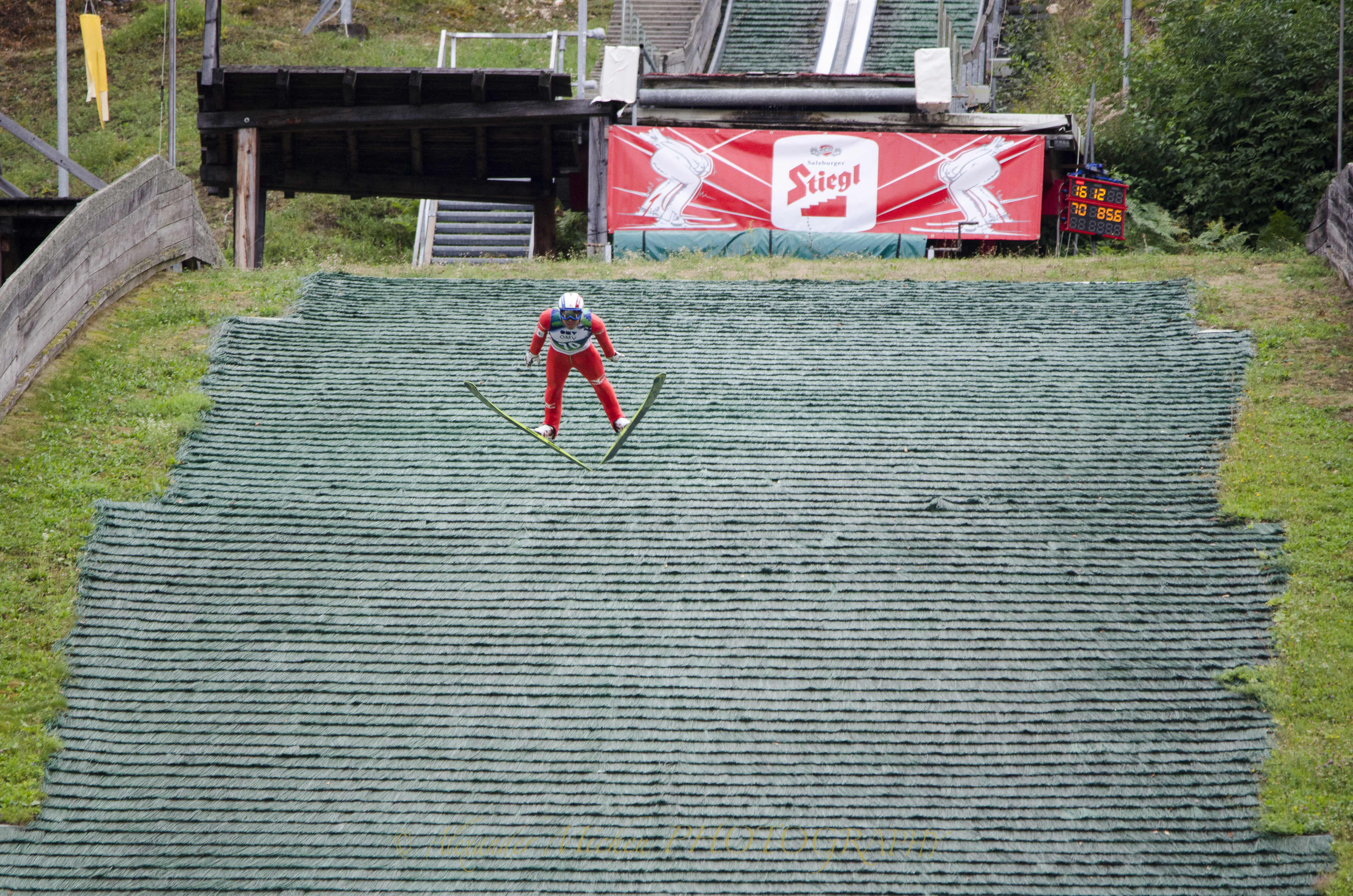 FIS Sommer Grand Prix Nordische Kombination 27. / 28. August 2013 Villach Möltschach